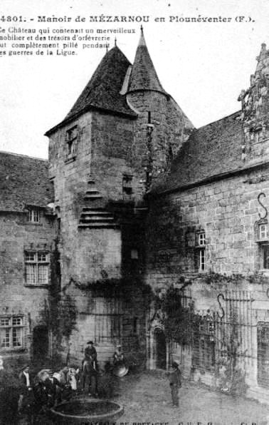 Le manoir de Mézarnou (carte postale, vers 1900, auteur non trouvé)